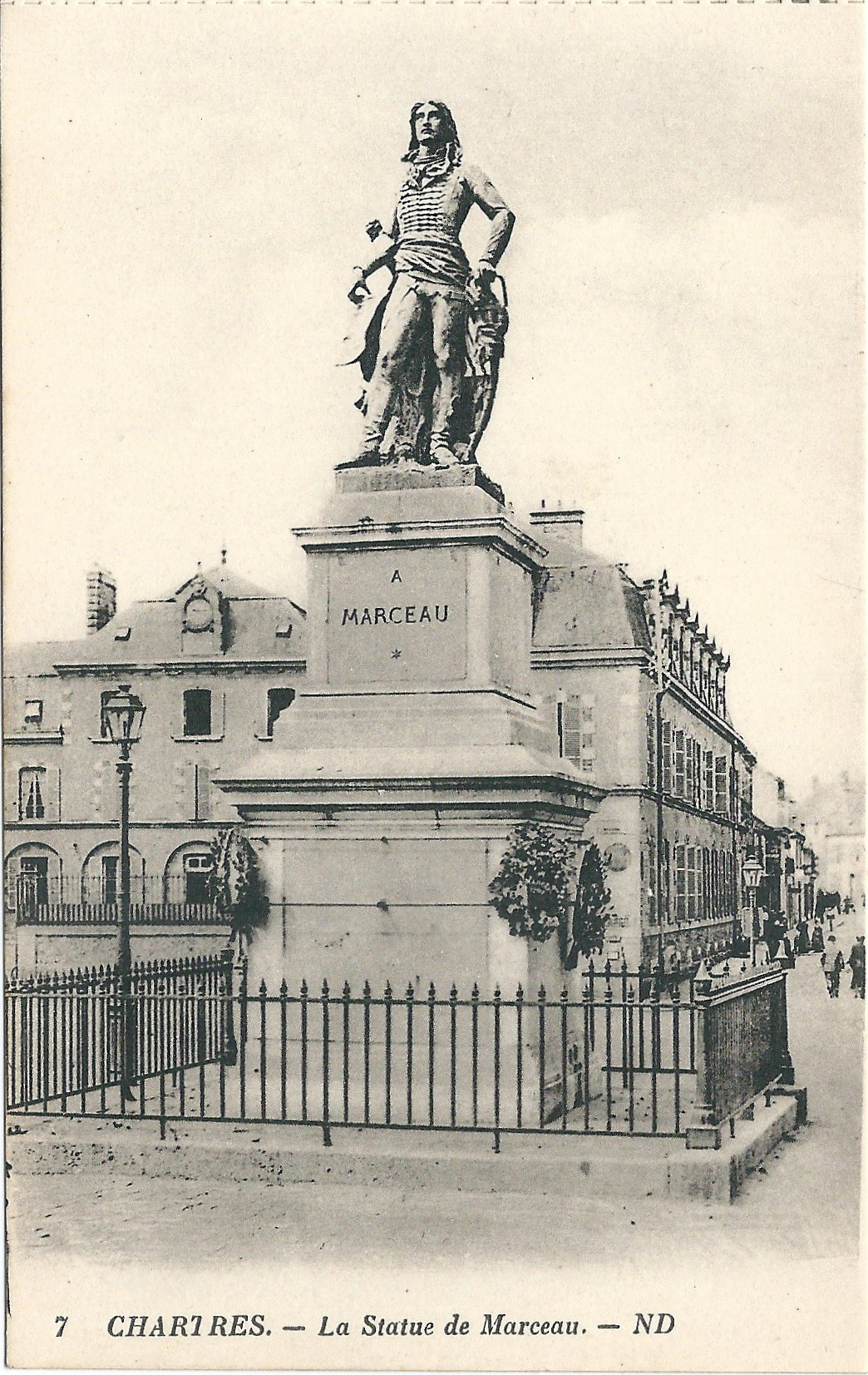 Carte postale de Chartres (Eure-et-Loir, France), vers 1910